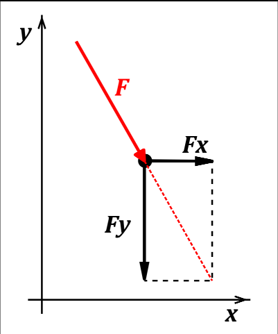 Rozklad sil (1)